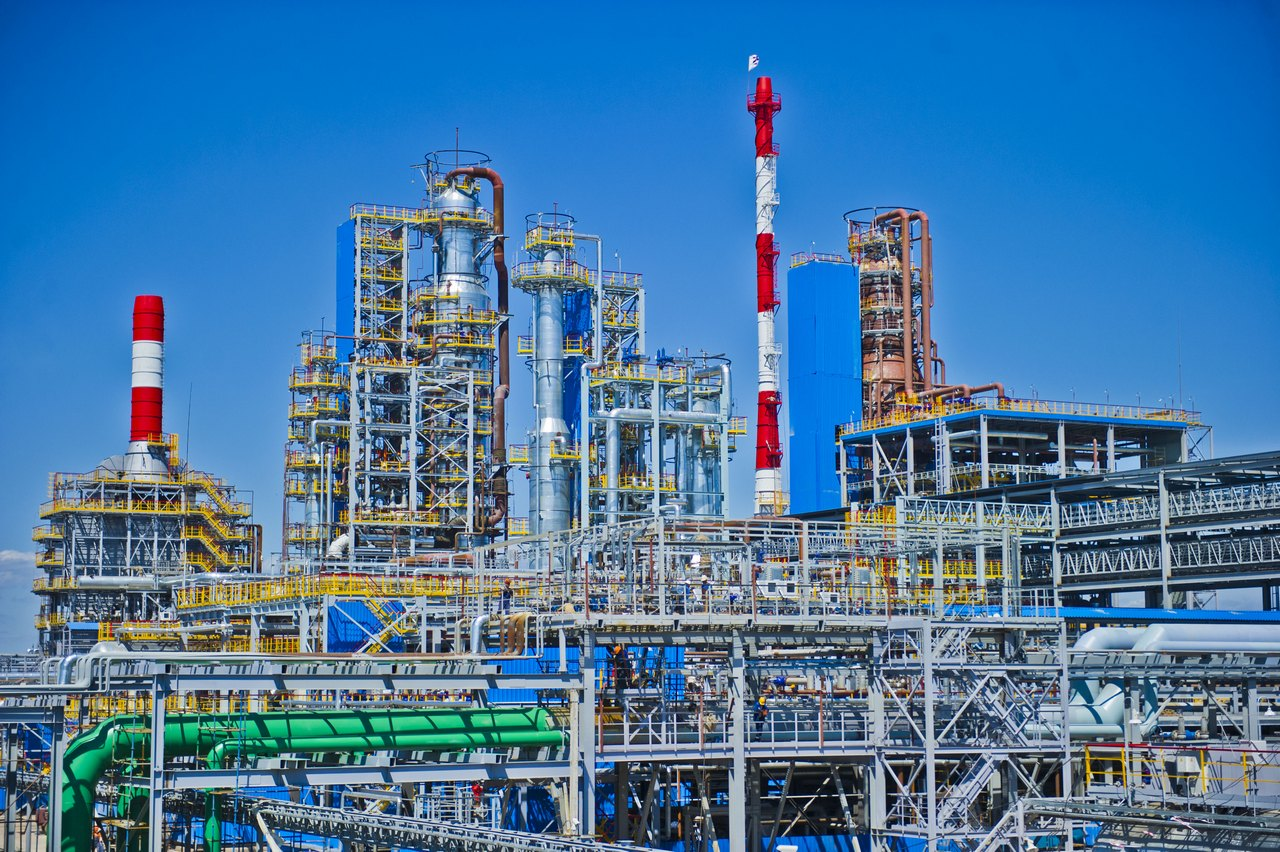 Газпром нефтехим Салават